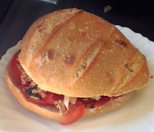 un pan bagnat de la rue Miralheti à Nice